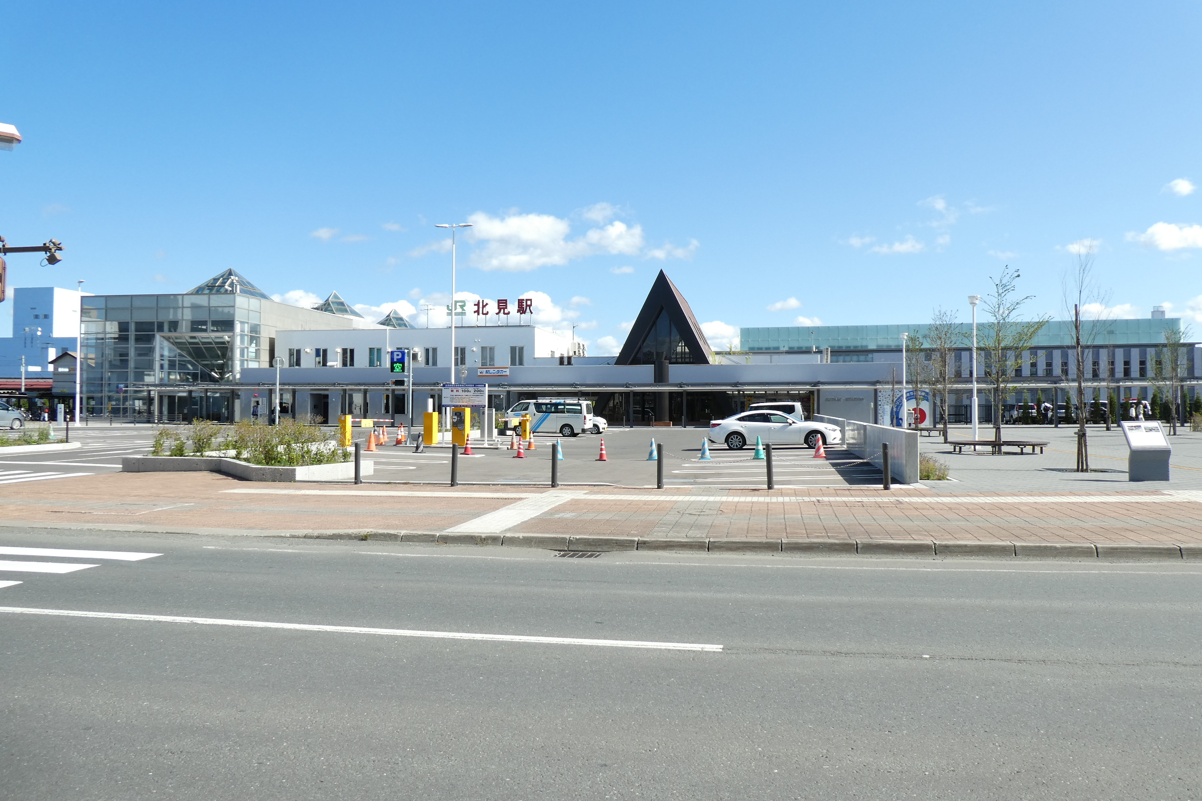 北海道北見市、石北本線 北見駅